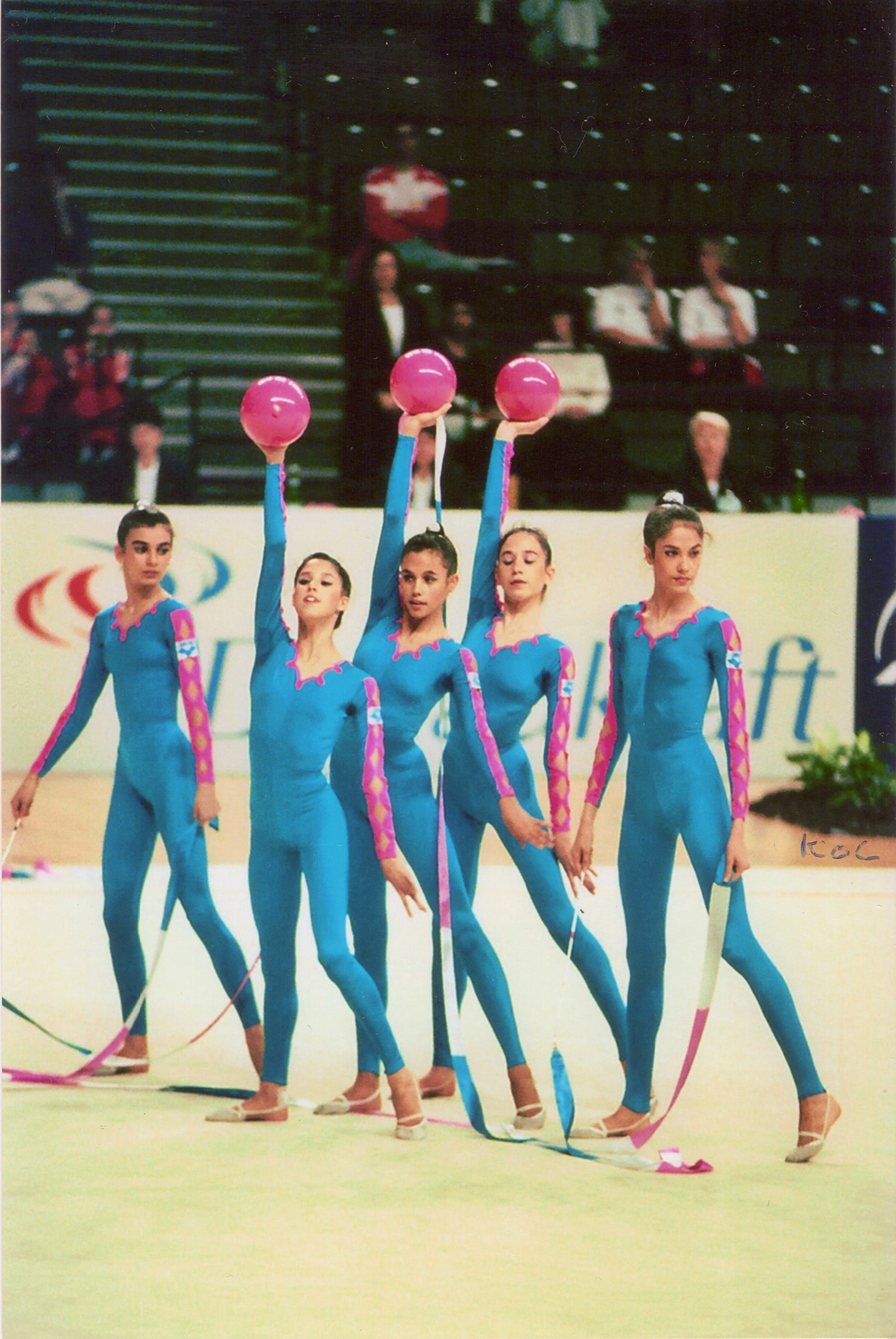 Ejercicio de 3 pelotas y 2 cintas del conjunto español en el concurso general del Campeonato Mundial de Gimnasia Rítmica de 1995 en Viena.